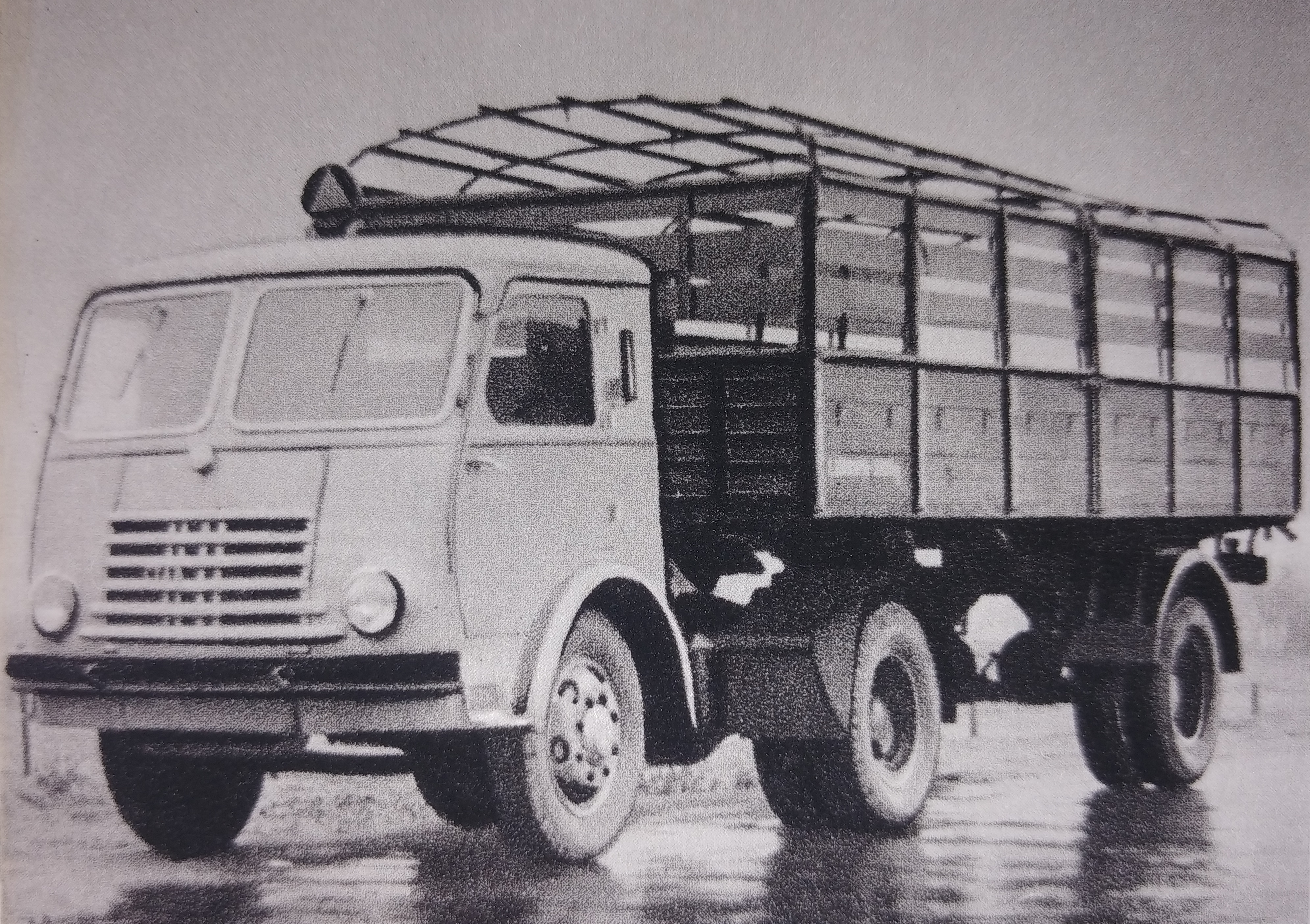 Ciągnik siodłowy Star C-60 i jednoosiowa naczepa D-60